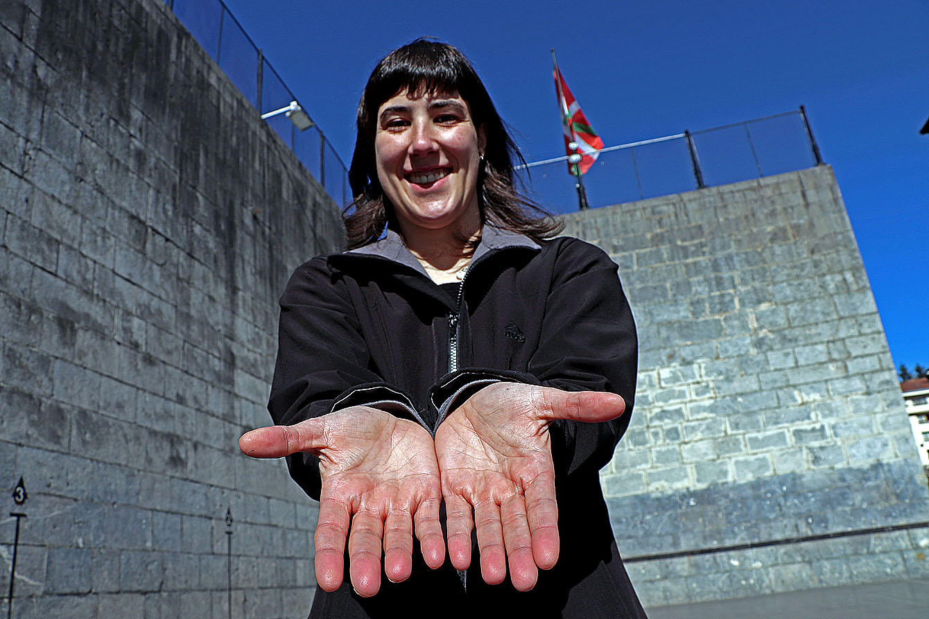 Leire Etxaniz txapelduna esku pilotan.